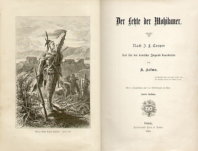 Der Letzte der Mohikaner. Nach J. F. Cooper frei für die deutsche Jugend bearbeitet von A. Helms. Mit 12 Tonbildern und 126 Abbildungen im Text. Zweite Auflage. Leipzig, Ferdinand Hirt & Sohn. 1888. Die im Buch befindlichen Illustrationen stammten von Michał Andriolli für die um 1885 bei Libraire de Firmin-Didod et Cie erschienene französische Cooper-Ausgabe.